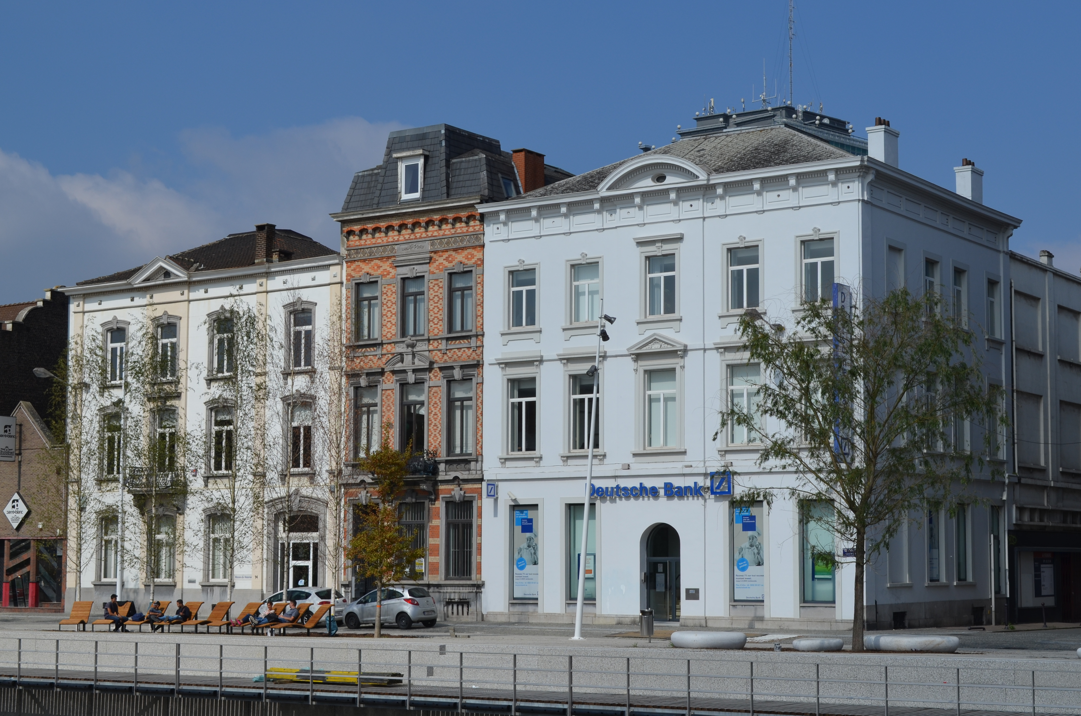 Charleroi (Belgique) - quai de Brabant, maisons n° 14, 15 et 16. n° 15, maison construite pour Barthel Dewandre en 1879 par l'architecte M. Hoyoux. Style éclectique ou néo-Renaissance Flamande. n° 16, maison également construite pour Barthel Dewandre en 1861. Style néo-classique. Source : Anne-Catherine Bioul, Alain Dauchot et Jean Alexandre Pouleur, Charleroi, ville d'architectures : Du Temps des Forteresses aux Années Folles 1666-1940, Bruxelles, Atelier Ledoux, Espace Environnement, 1992, p. 42 ; 52.